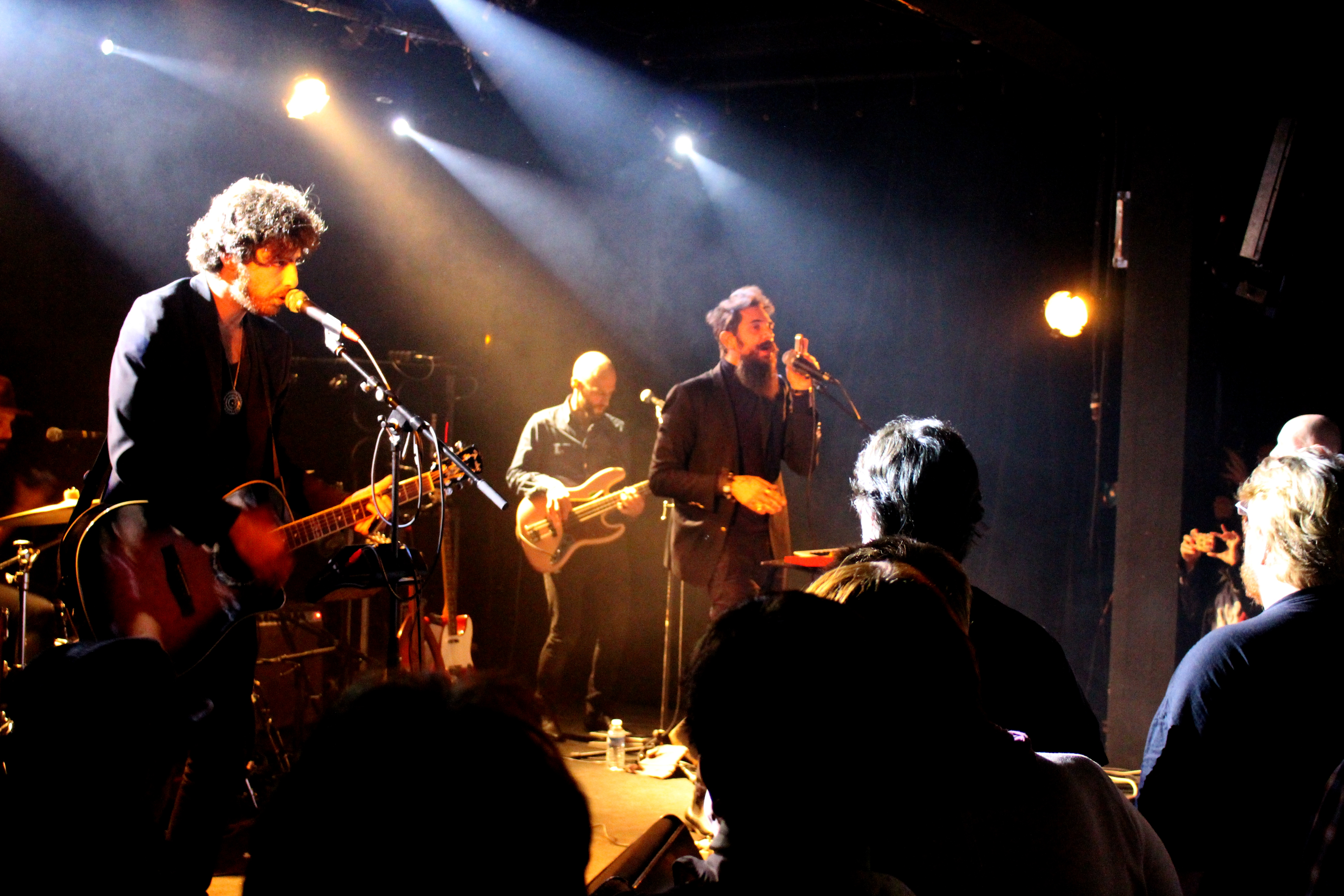 The Wanton Bishops, Atelier Arts Plume, Saint-Lô